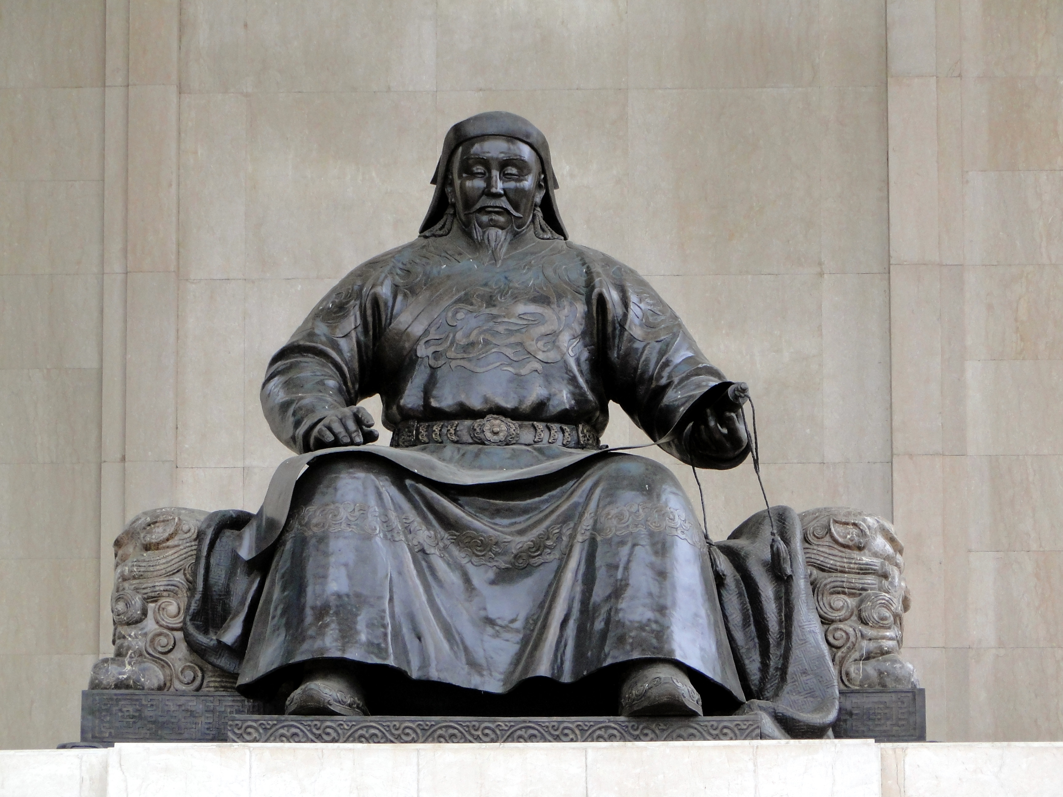 Kublai Khan